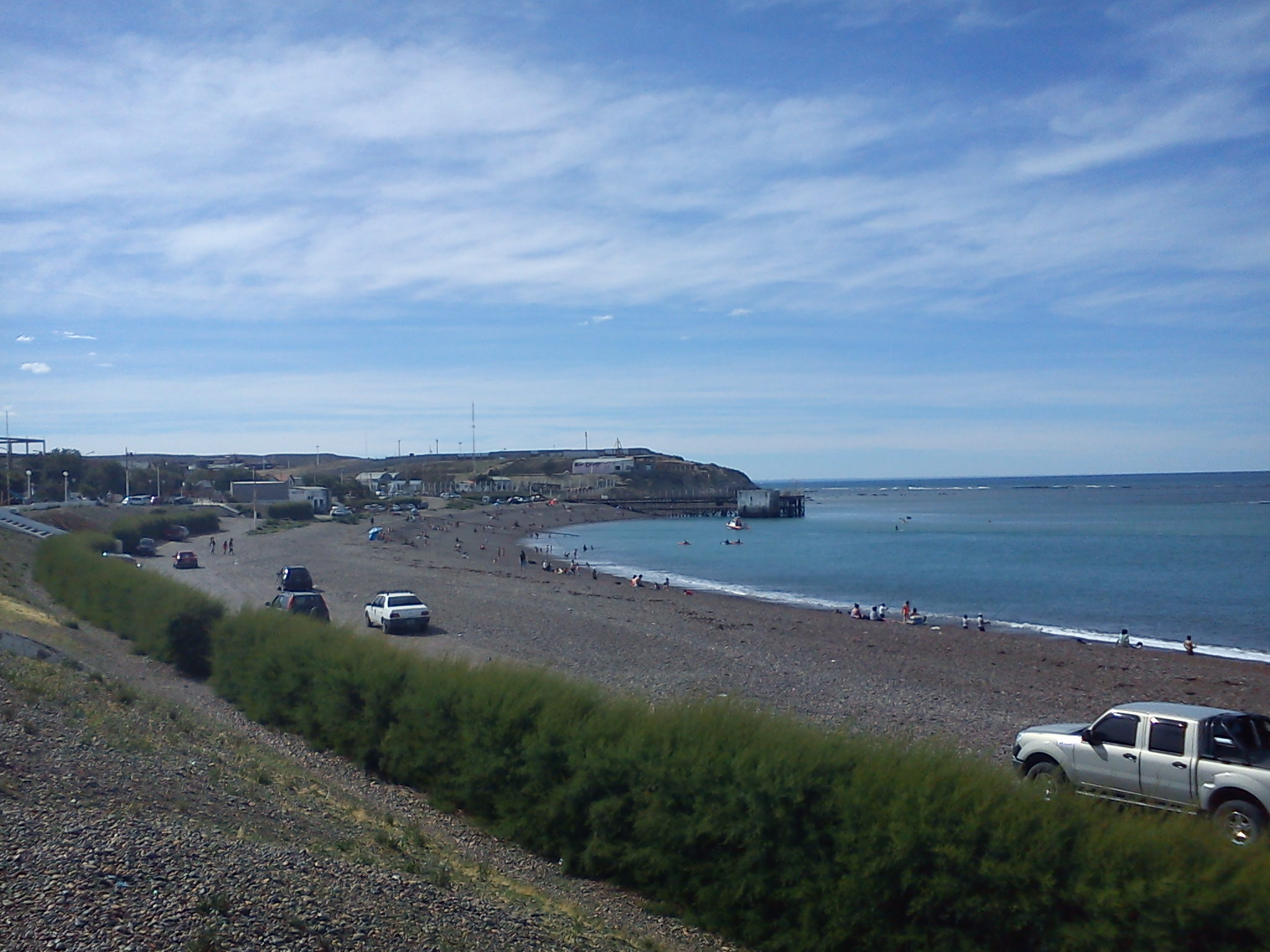 Vista al Muelle Viejo y a un sector del Balneario Municipal